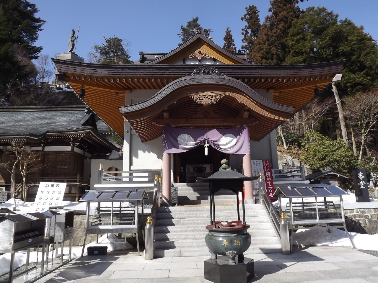 雲辺寺本堂